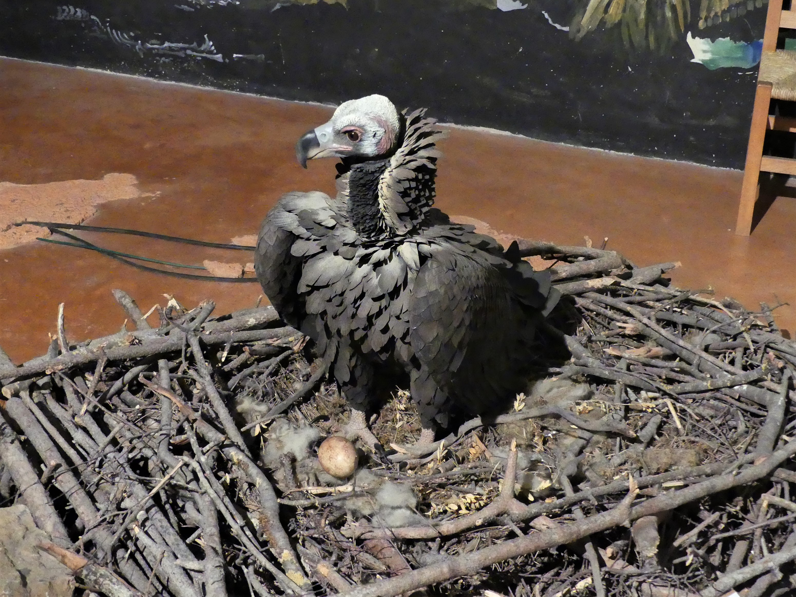 Reconstitution d'un nid de Vautour moine (Aegypius monachus) à la maison des Vautours, Saint-Pierre-des-Tripiers, Lozère, France.